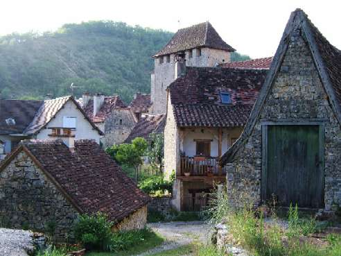 Le village de Saint-Martin-de-Vers dans la vallée du Vers, entre Rocamadour et Cahors. Cliché : Antoine Carette, juillet 2006.